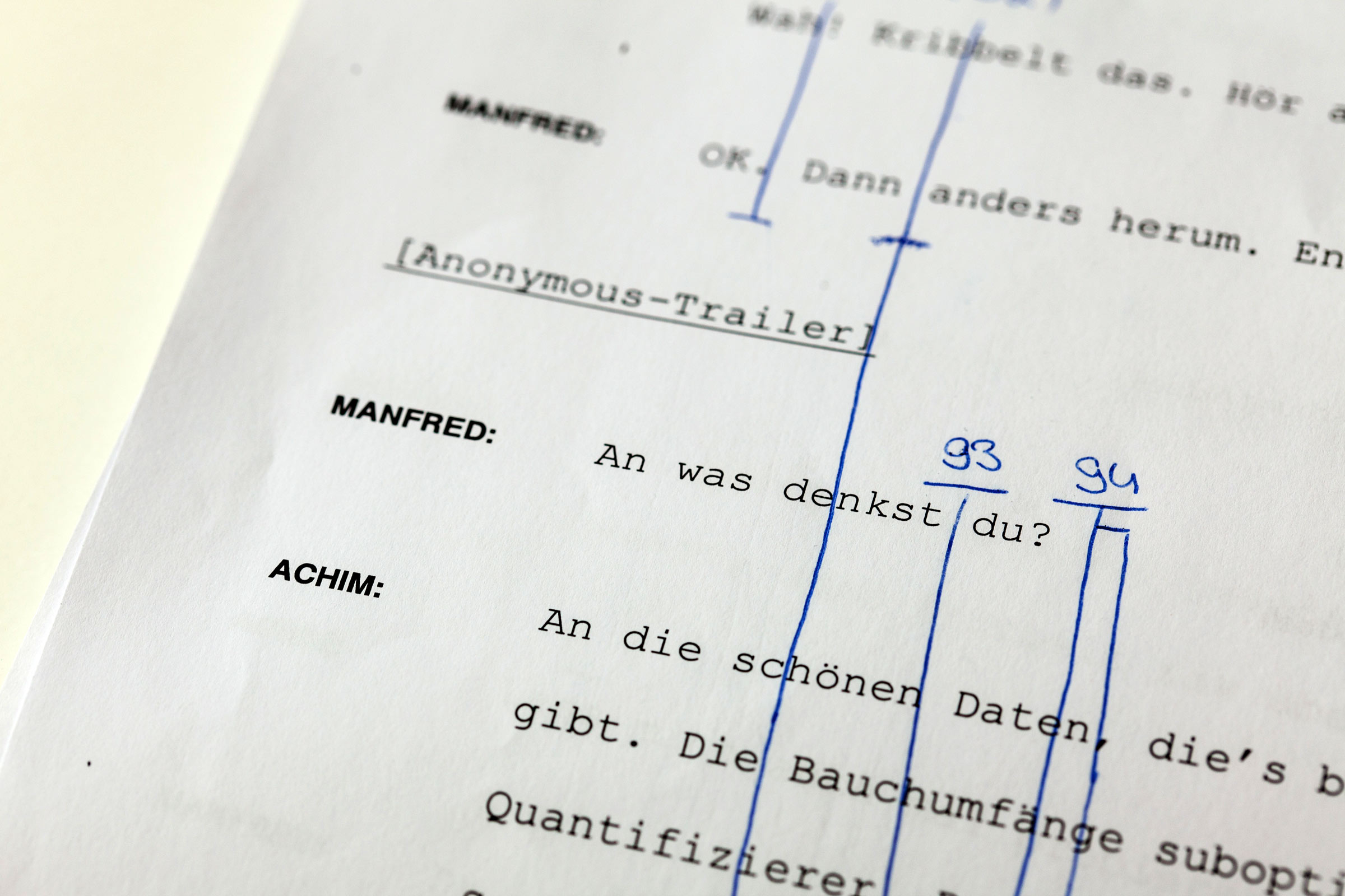 Ausschnitt aus einem Hörspielmanuskript. Links fett gedruckt die Namen der Rollen, rechts der gesprochene Text, in der Mitte ein Trenn-Element (hier: ein Trailer der Gruppe Anonymous). In Blau eingezeichnet die Schnitt- und Take-Markierungen der Technikerin im Deutschlandfunk. Die Zahl besagt, um welche Aufnahme-Nummer - also um welchen Take der Originalaufnahme mit den Schauspielern - es sich handelt. Der Beginn eines Strichs bedeutet, dass hier geschnitten werden kann - in der Regel, weil sich der Sprecher versprochen hat, oder weil der nachfolgende Take besser ins Gesamtwerk passte.